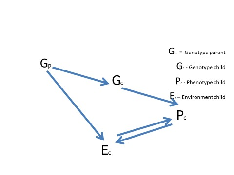 מודל על יחסי הגומלין בין תורשה וסביבה: המודל של (1983Scarr & McCartney )